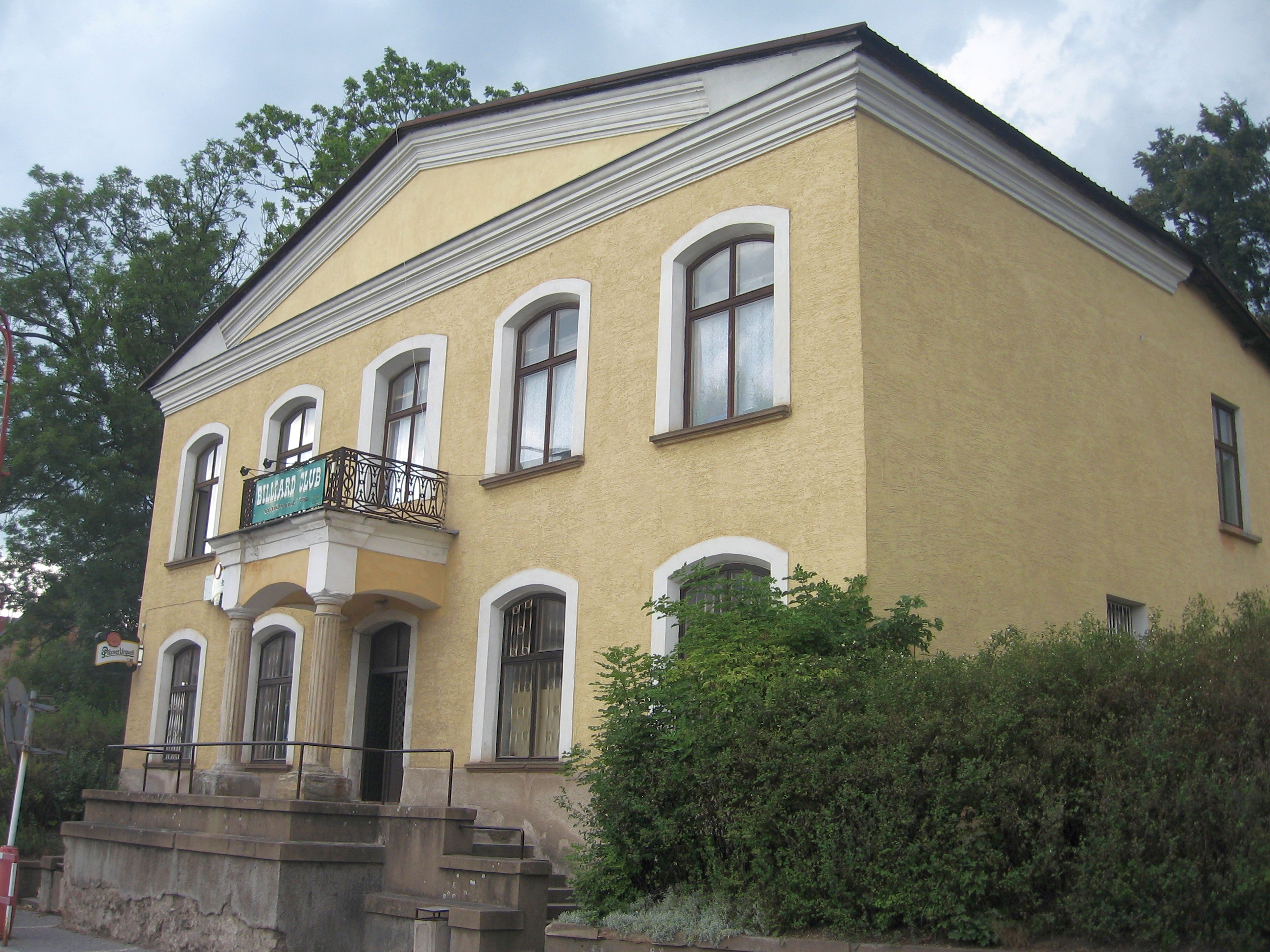 Městský dům v Červeném Kostelci, dříve částečná zřícenina, dnes bowling bar